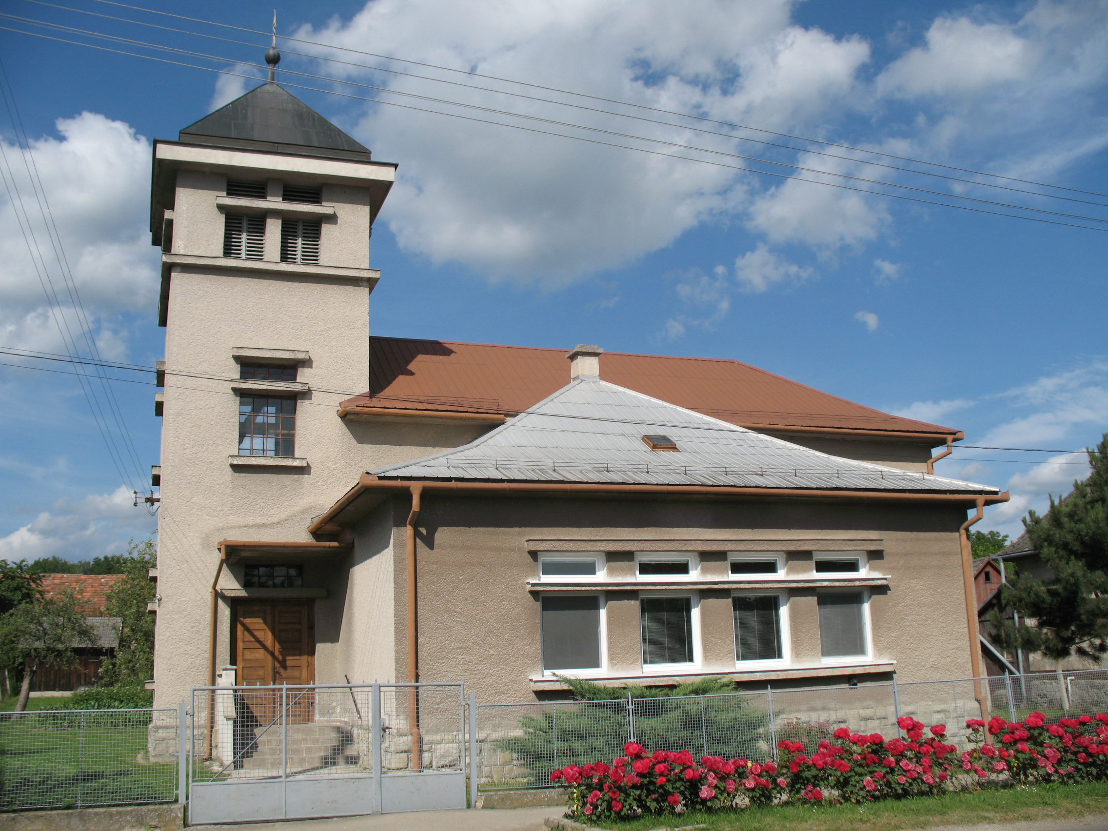 Dezsér